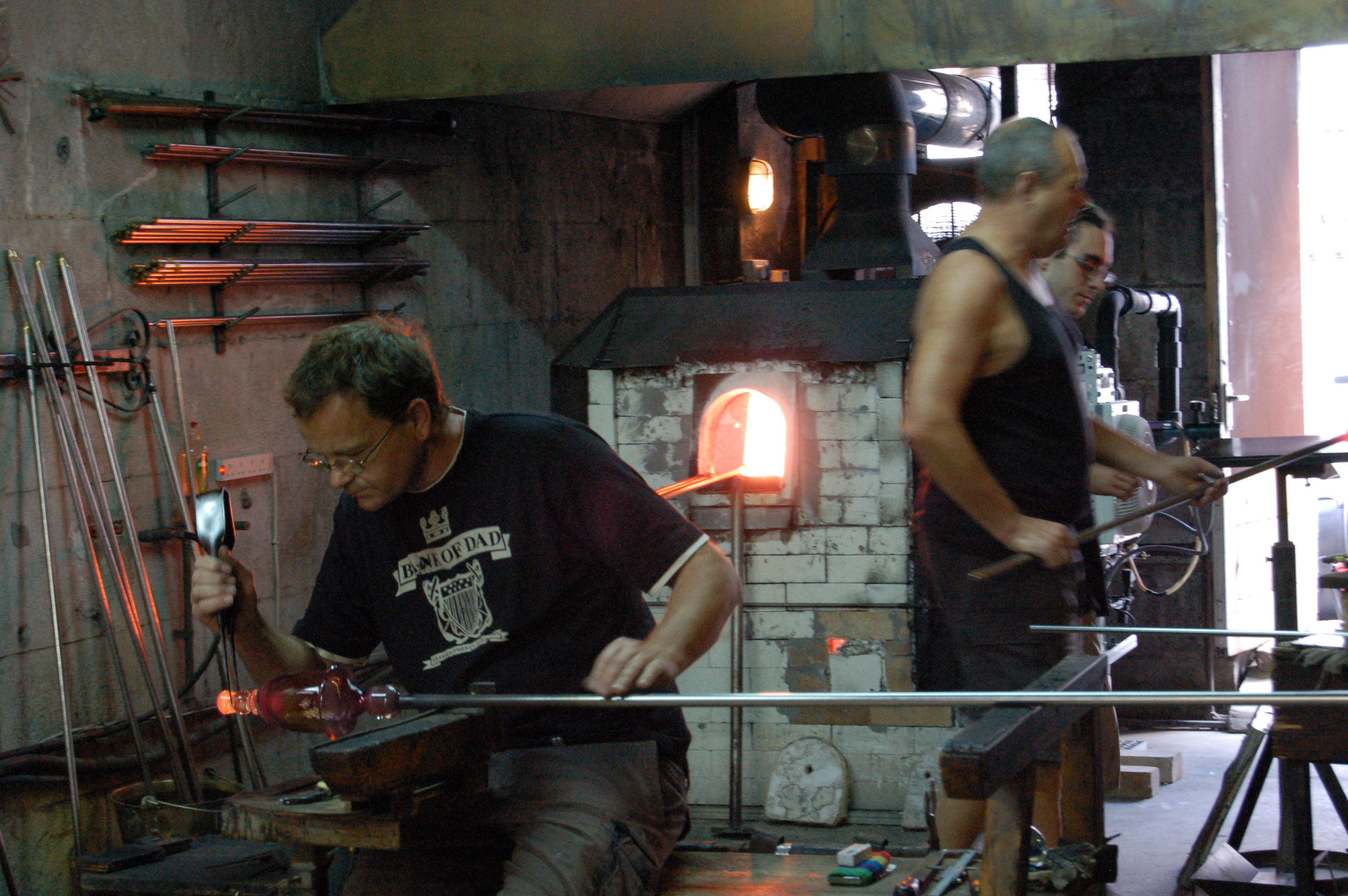 Sklep z ręcznie robionym szkłem, można obejrzeć produkcję wyrobów. / Gibraltar Crystal Factory, where you can watch the glass blowers at work.